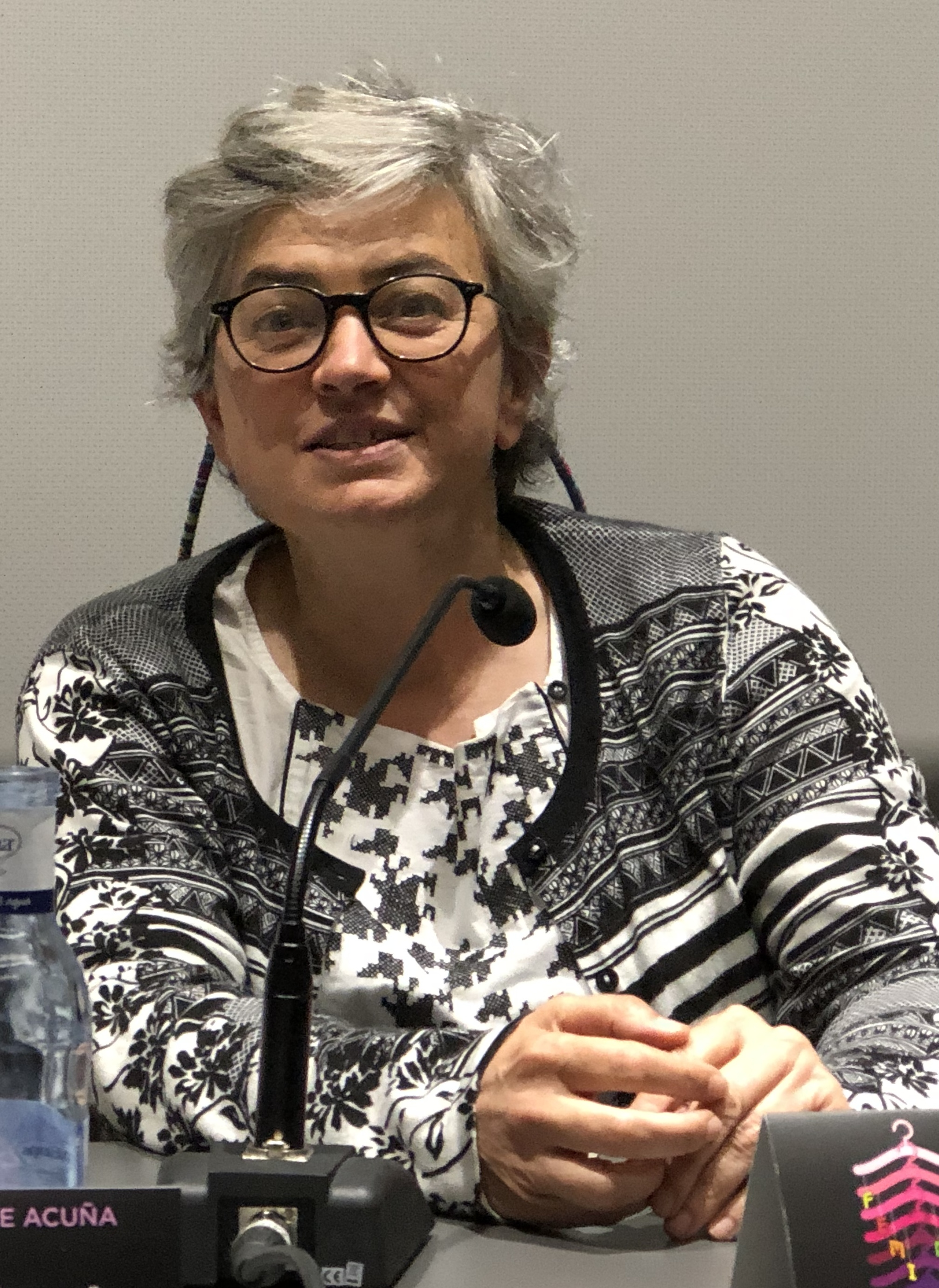 Escuela Rosario Acuña Gijón 2019